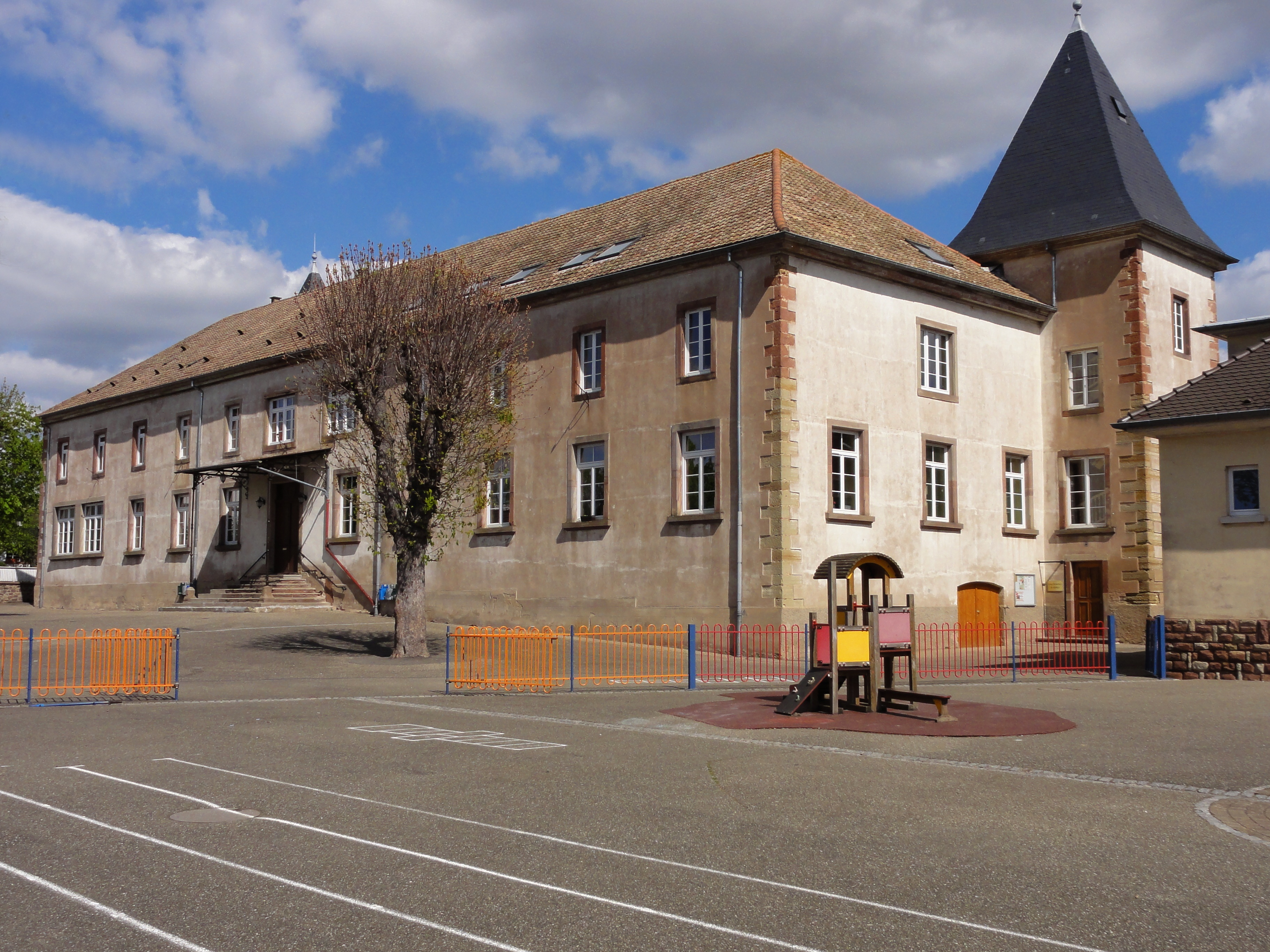 Alsace, Bas-Rhin, Dettwiller, Ancien château des Rosen (XVIIe, reconstruit au XIXe), actuellement école, 37 rue du Château (IA00055570).